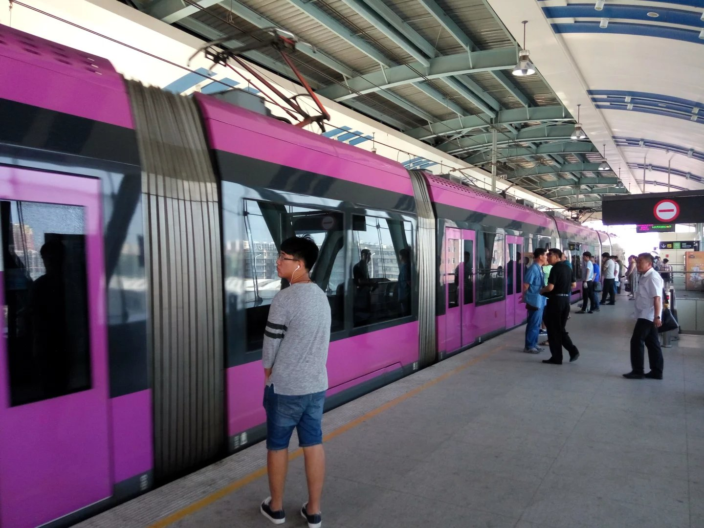 4号线职业学院站站台